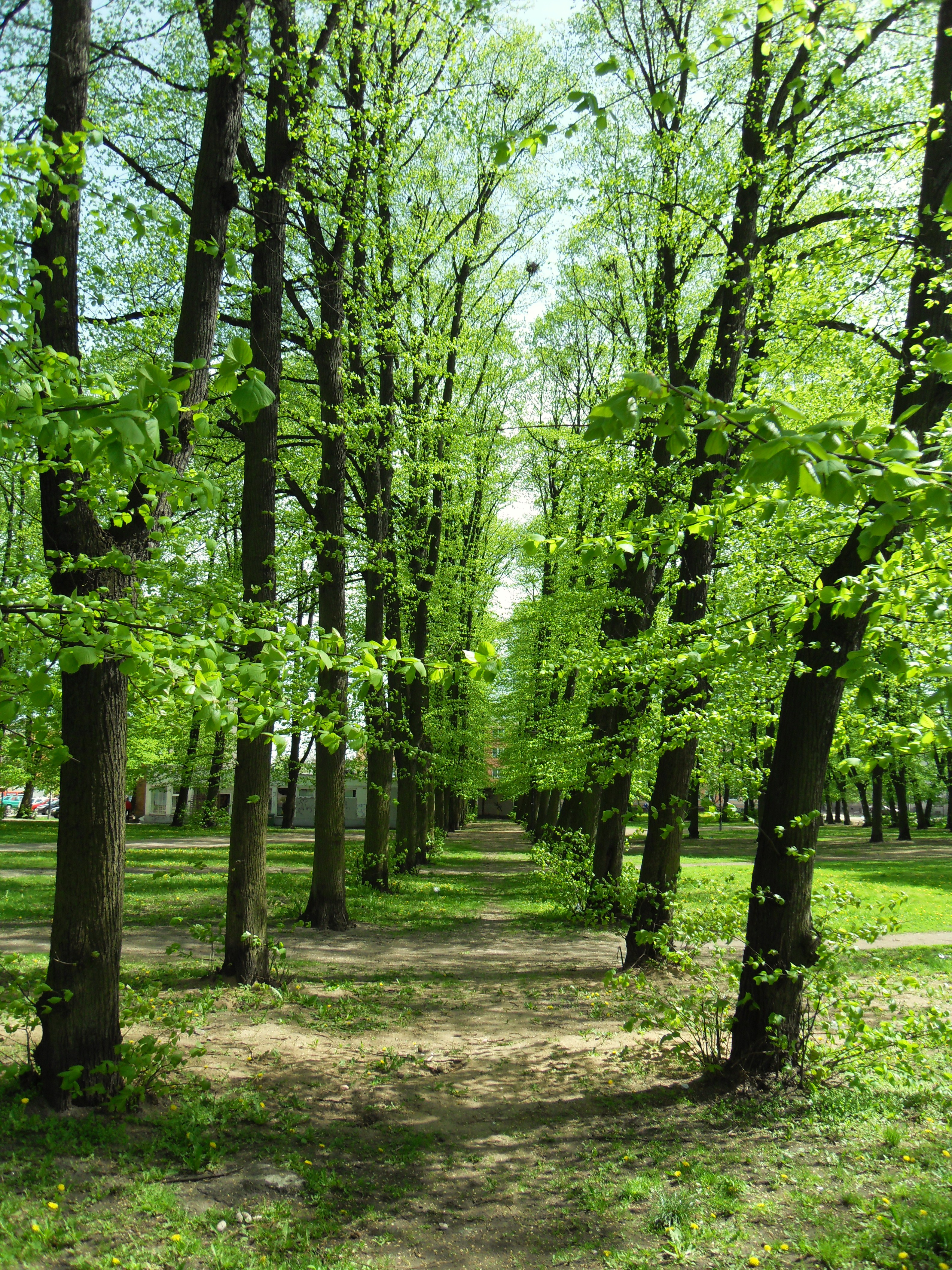 Gdańsk Orunia, teren byłego cmentarza ewangelickiego (część wschodnia).